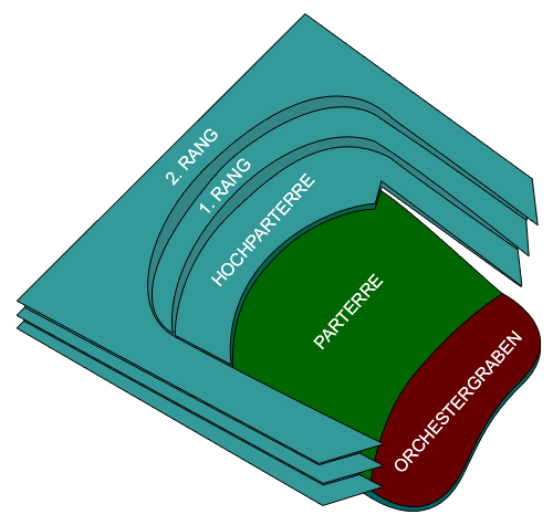 Zuschauerebenen im Auditorium